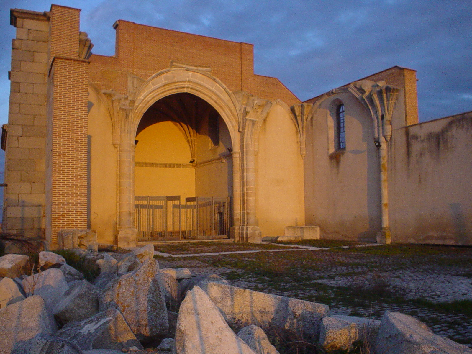 Restos de la iglesia parroquial de Santa María La Mayor en Villanueva de Gómez. Ávila (España)